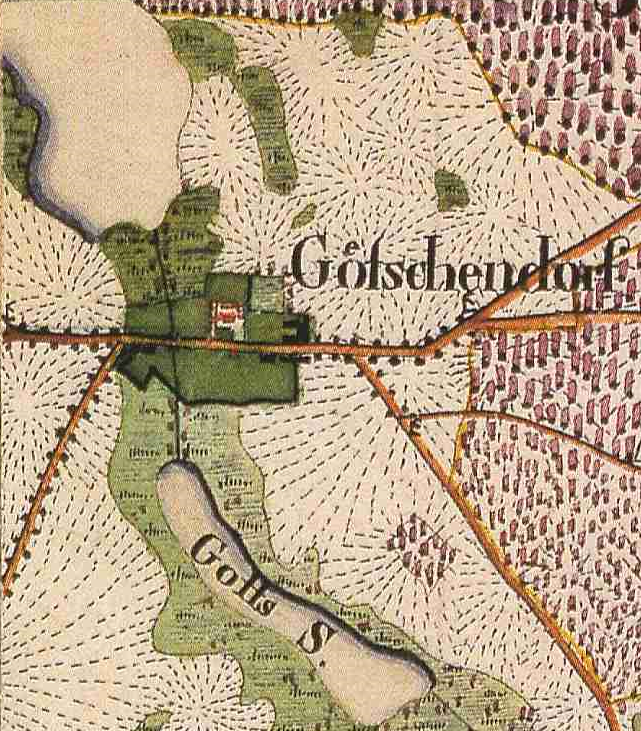 Götschendorf, Gemeinde Milmersdorf, Lkr. Uckermark, Brandenburg, Ausschnitt aus dem Urmesstischblatt 2948 Friedrichswalde von 1826